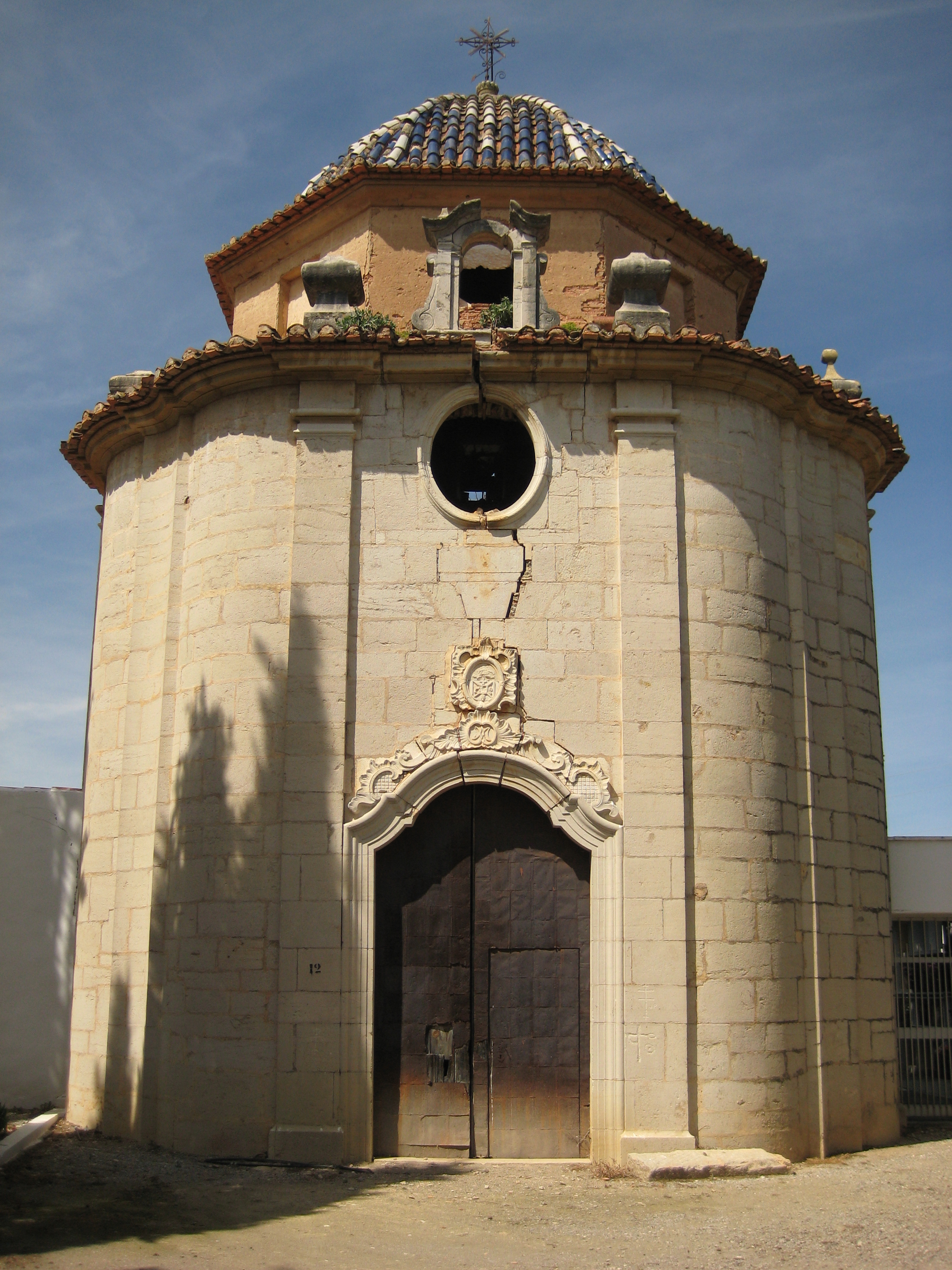 Façana principal de l'ermita de la Mare de Déu dels Àngels de La Jana (Baix Maestrat)